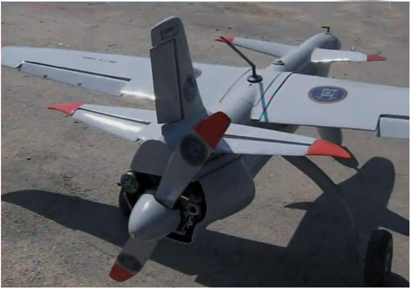 AL fajer L-10 algérien drône